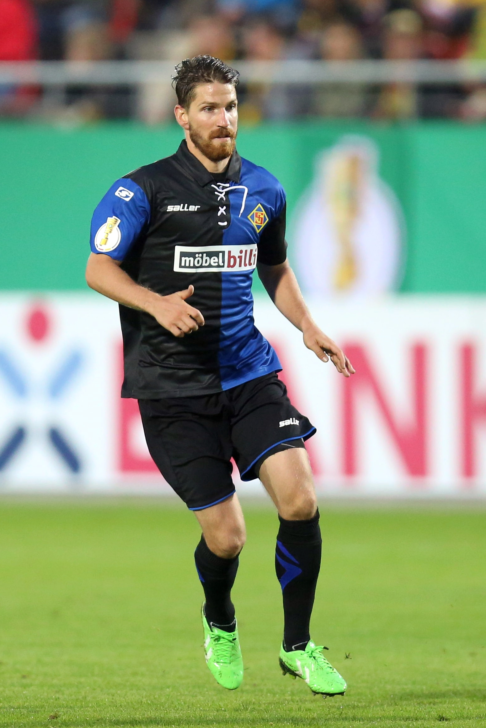 DFB-Pokal 2017/18, 1. Hauptrunde, TuS Koblenz gegen SG Dynamo Dresden: Andreas Glockner (TuS Koblenz)